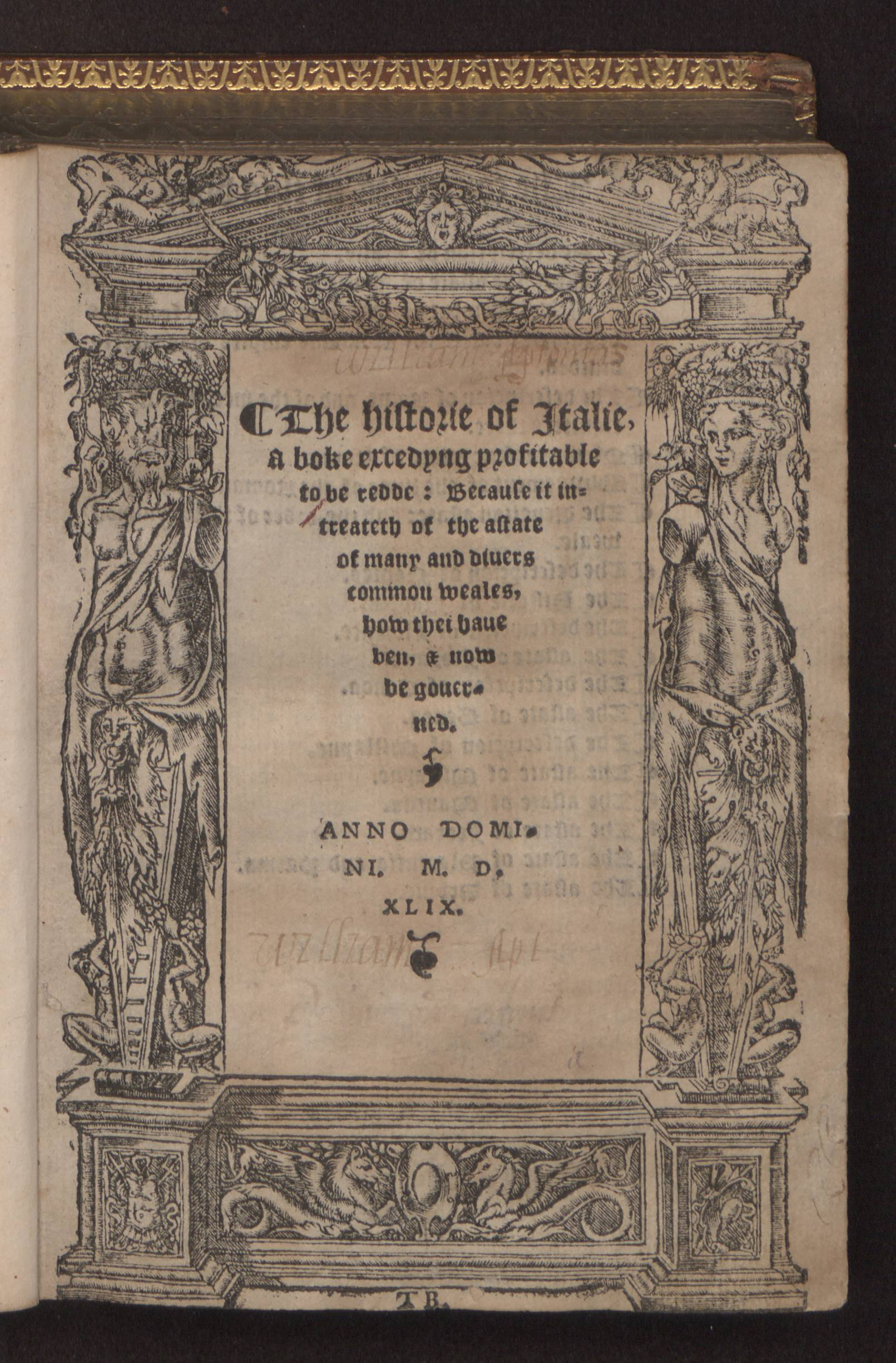 Frontespizio